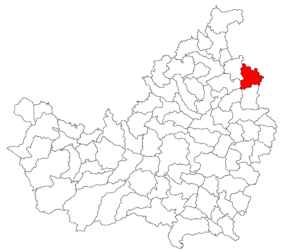 Categorie:Hărţi ale judeţului Cluj